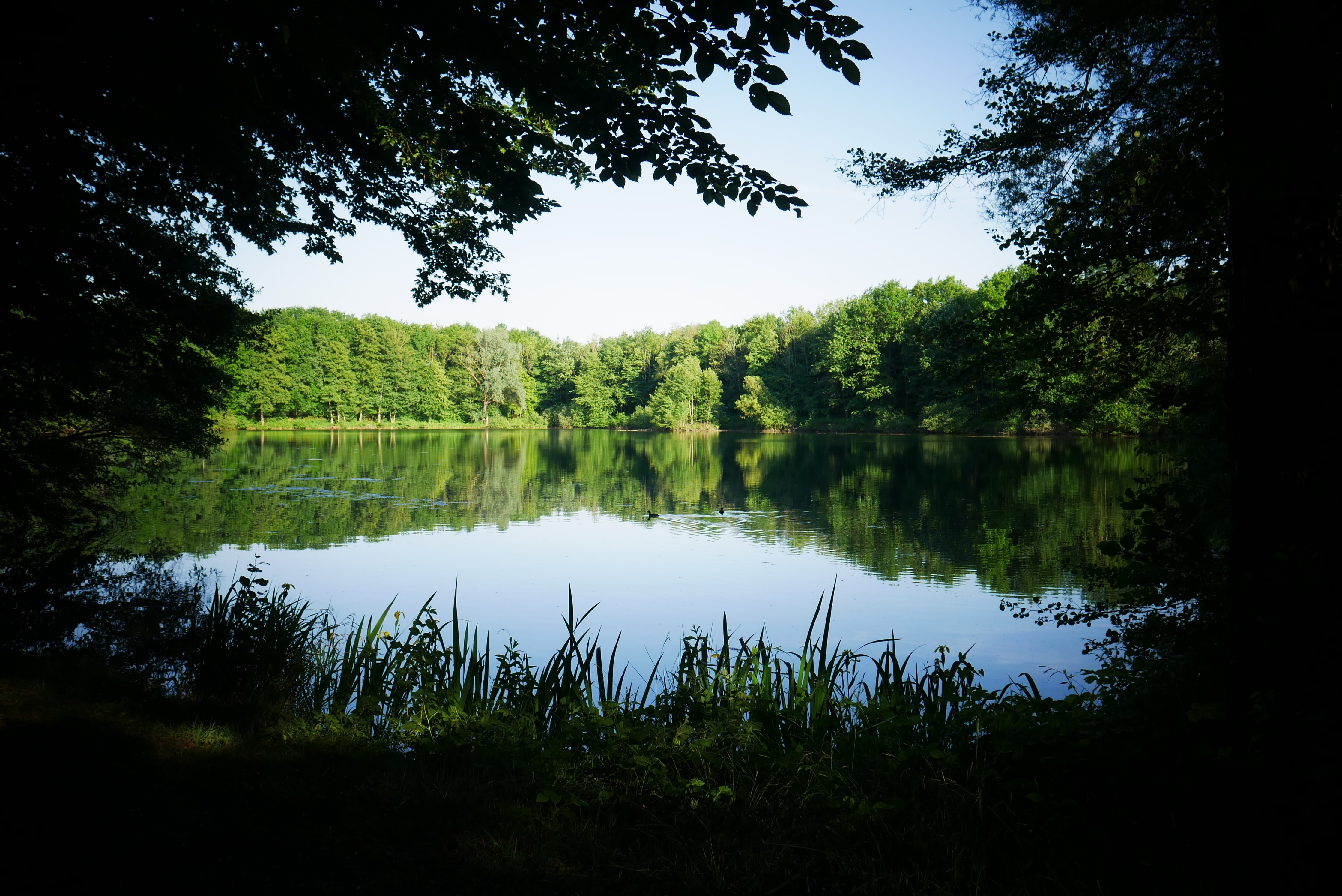 See am südlichen Rand des Naturschutzgebietes Teninger Unterwald. Grenzt am östlichen Rand an die Autobahn A5.